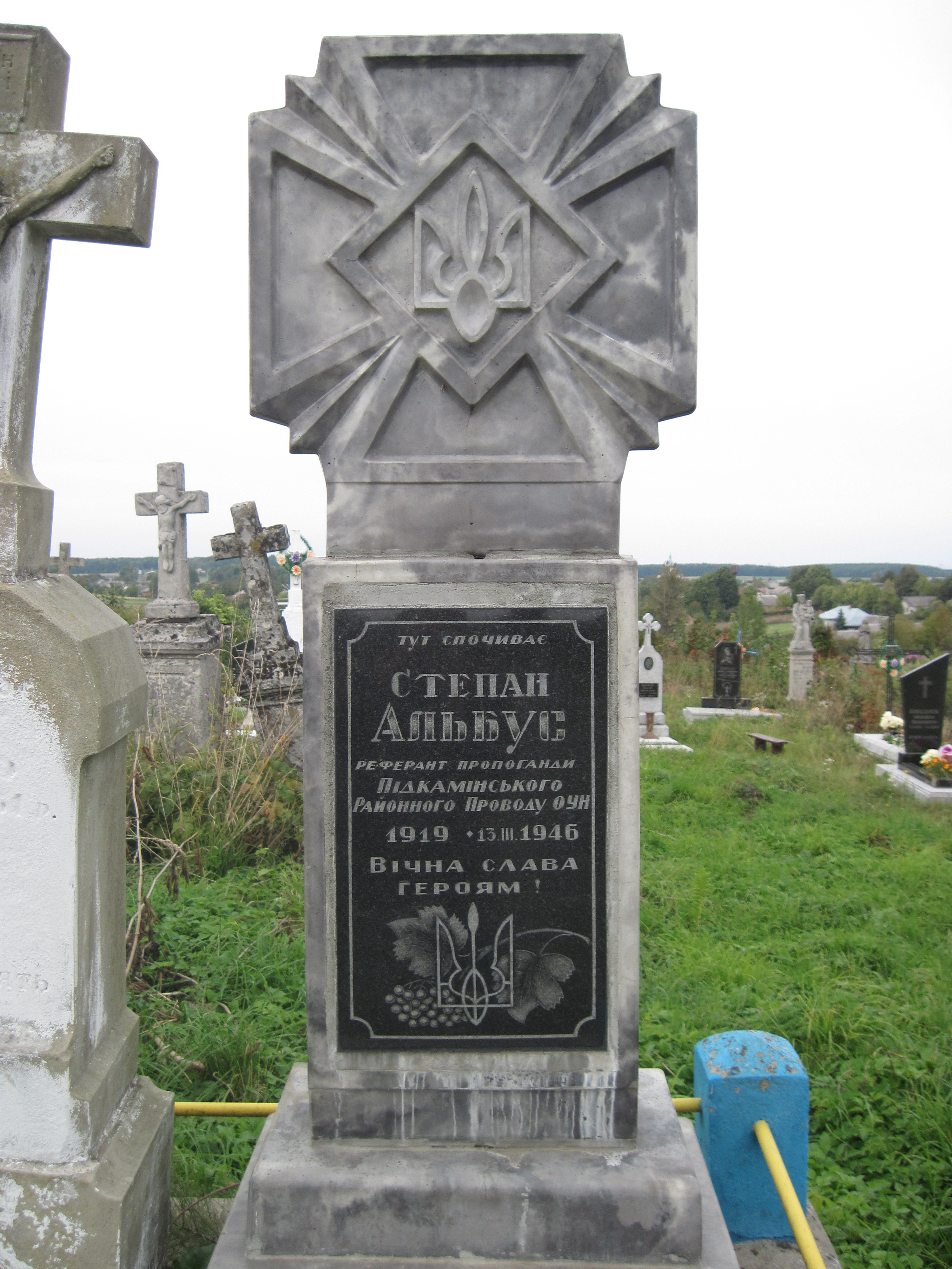 гила Степан АльбусаPidkamin?